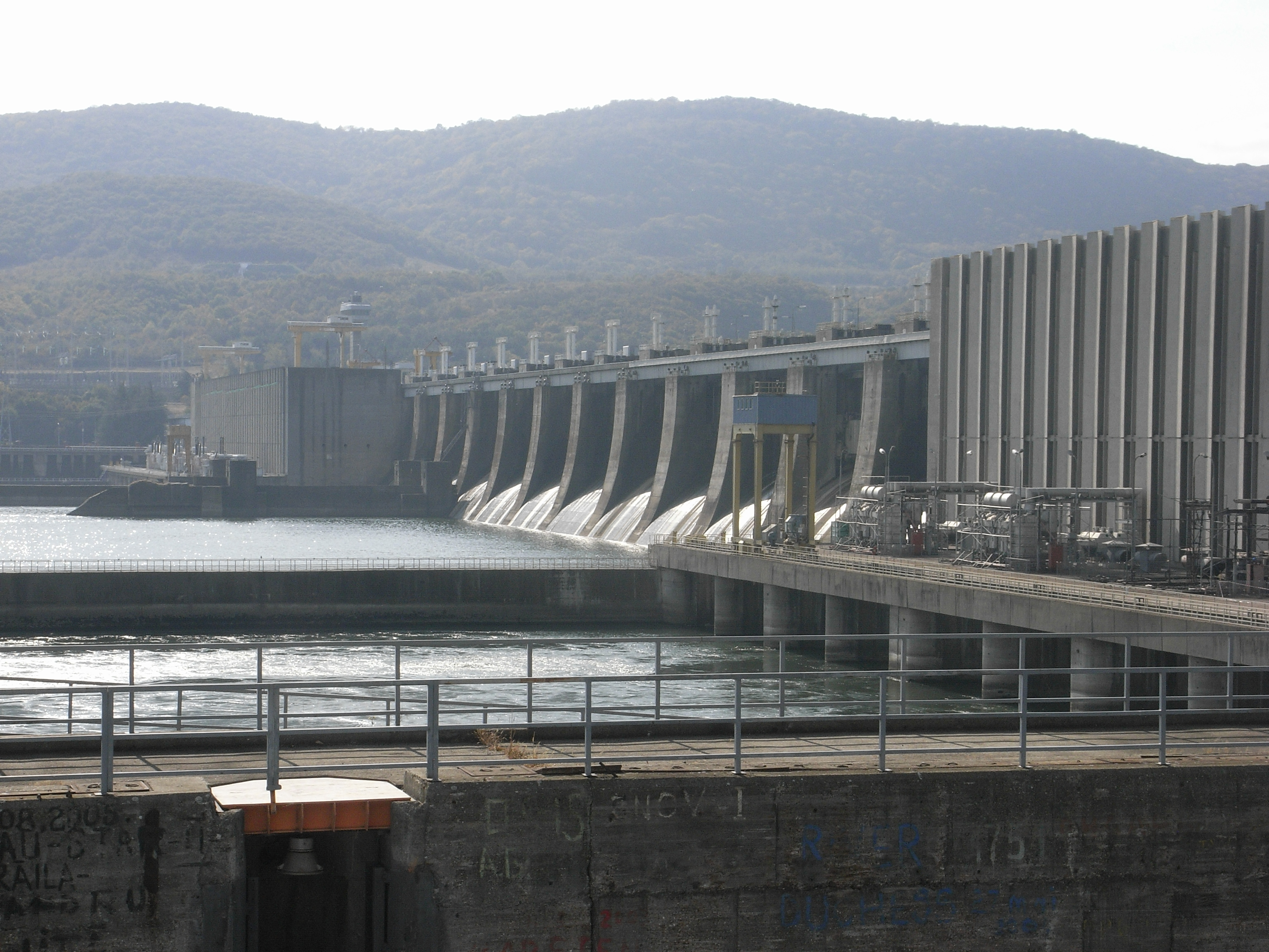 Djerdap 1